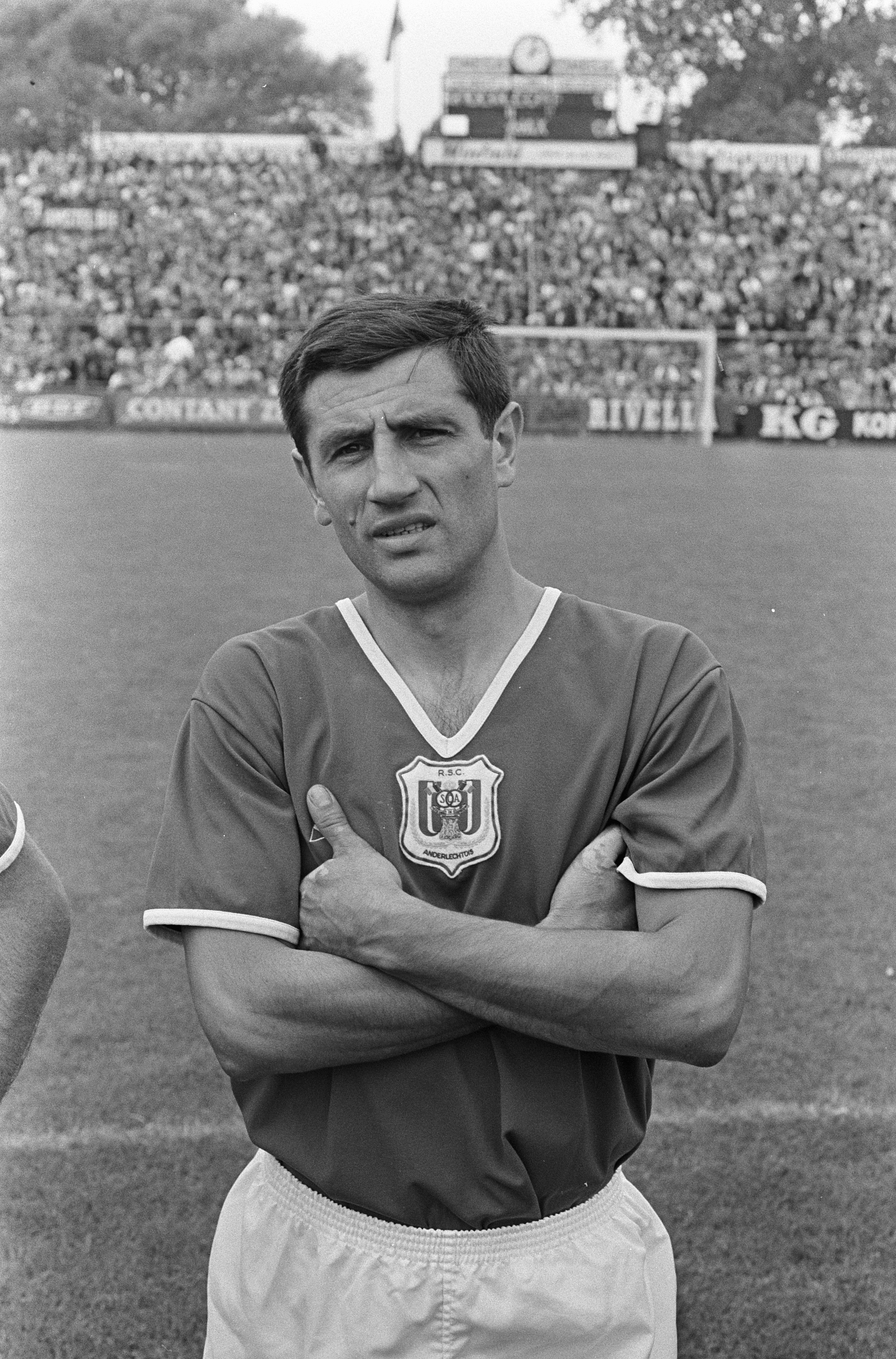 Collectie / Archief : Fotocollectie Anefo Reportage / Serie : [ onbekend ] Beschrijving : Pierre Hanon. Ajax tegen Anderlecht. Spelmomenten Datum : 6 augustus 1967 Trefwoorden : sport, voetbal Persoonsnaam : Anderlecht Instellingsnaam : AJAX Fotograaf : Kroon, Ron / Anefo Auteursrechthebbende : Nationaal Archief Materiaalsoort : Negatief (zwart/wit) Nummer archiefinventaris : bekijk toegang 2.24.01.05 Bestanddeelnummer : 920-5747